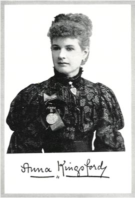 Anna Bonus Kingsford (1846-1888)